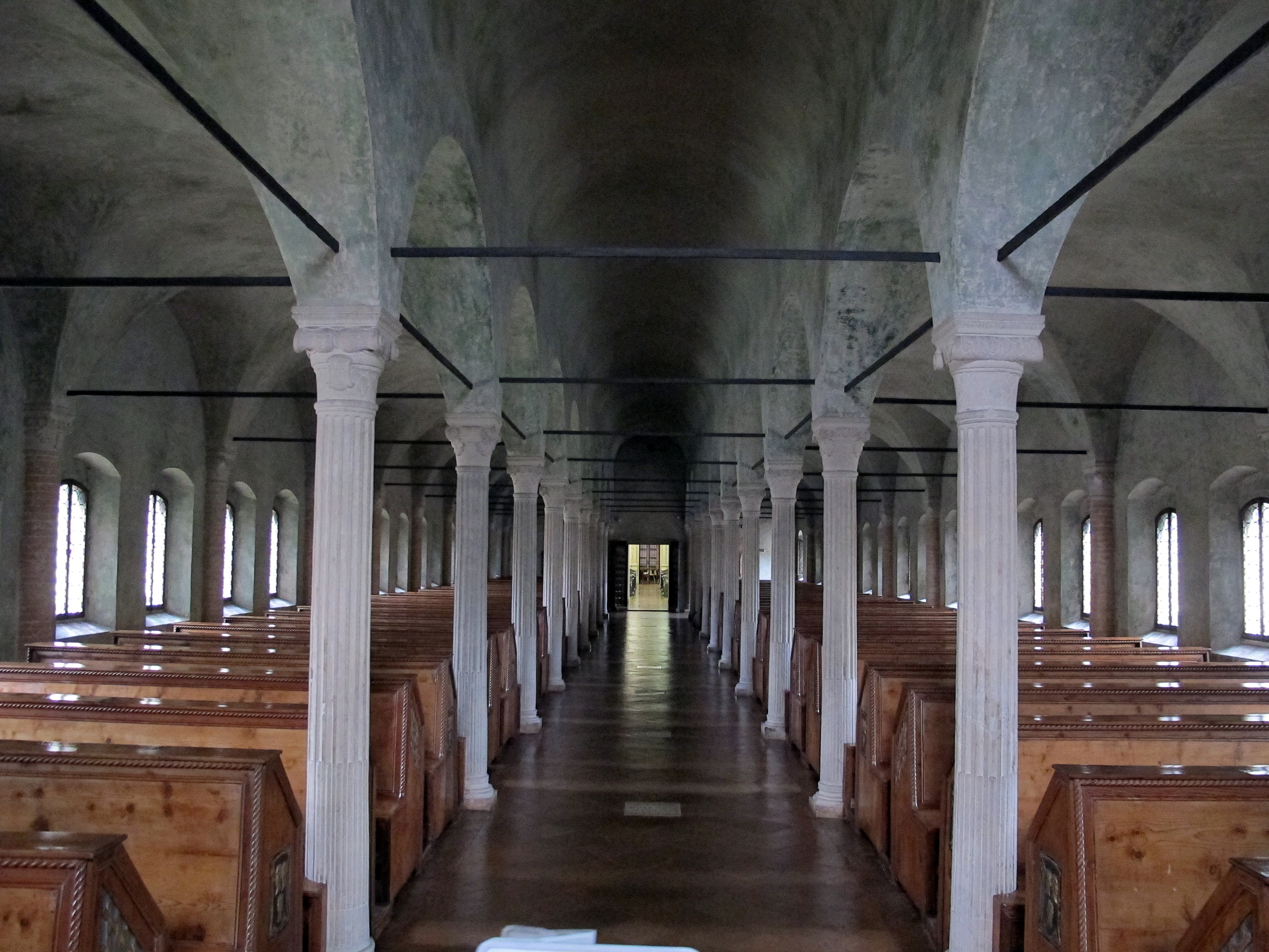 Biblioteca Malatestiana - MIBAC This is a photo of a monument which is part of cultural heritage of Italy.